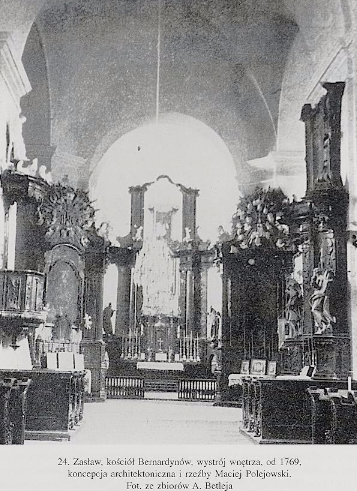 Головний вівтар, костел бернардинів, Заслав